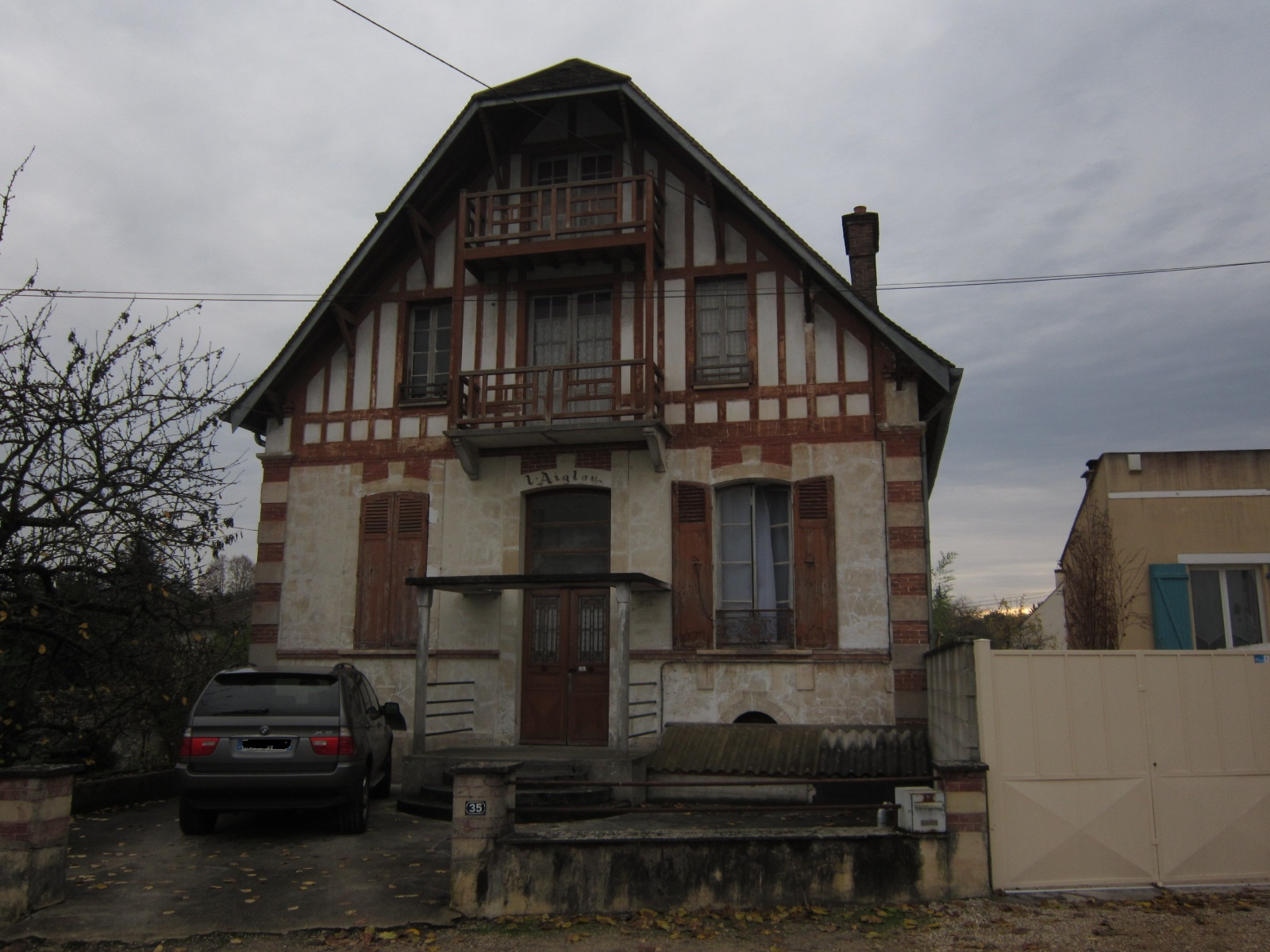 Maison L'aiglon, Veneux-les-Sablons (Seine-et-Marne)